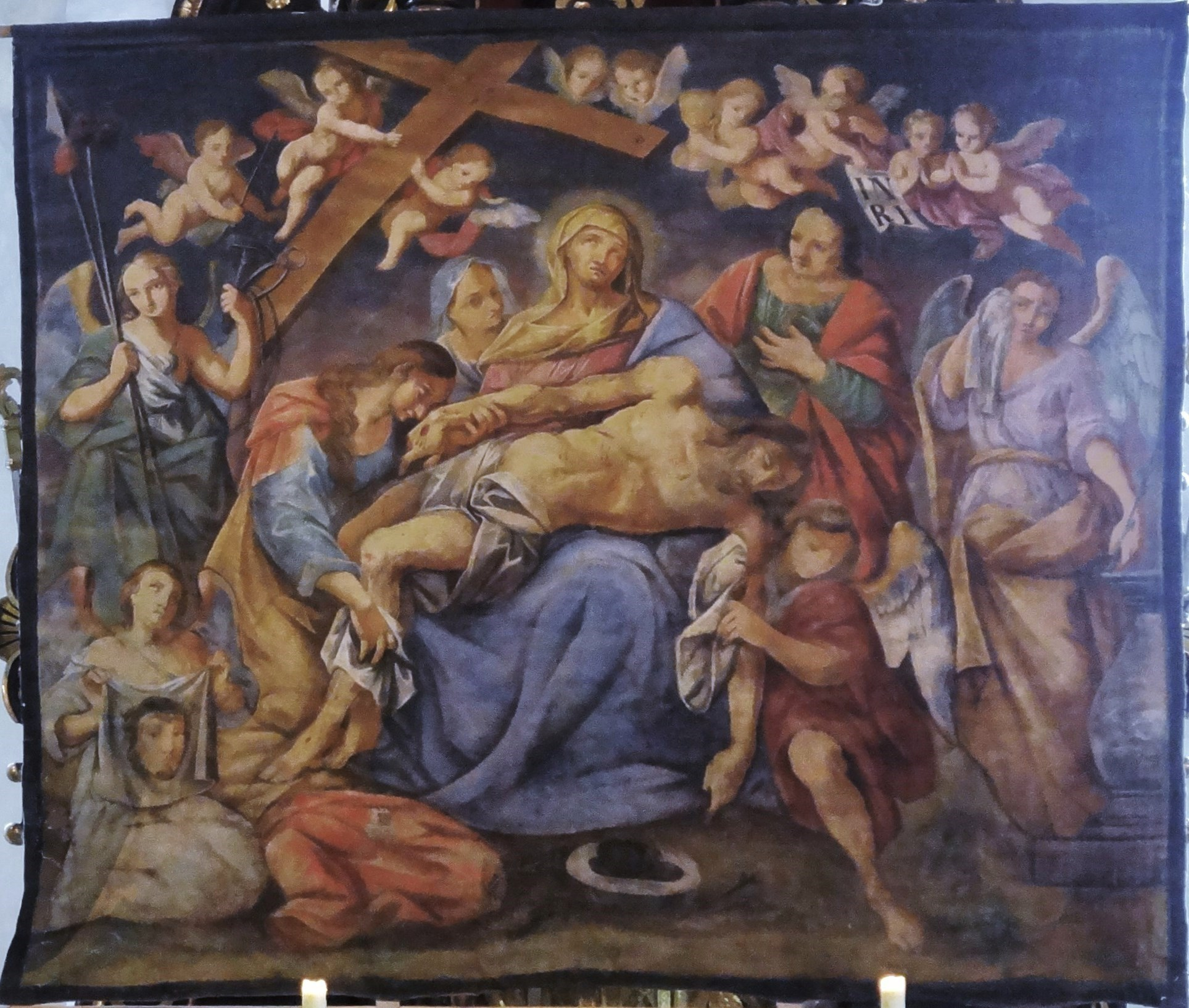 Pfarrkirche Deutsch Griffen, Fastentuch (18. Jahrhundert)